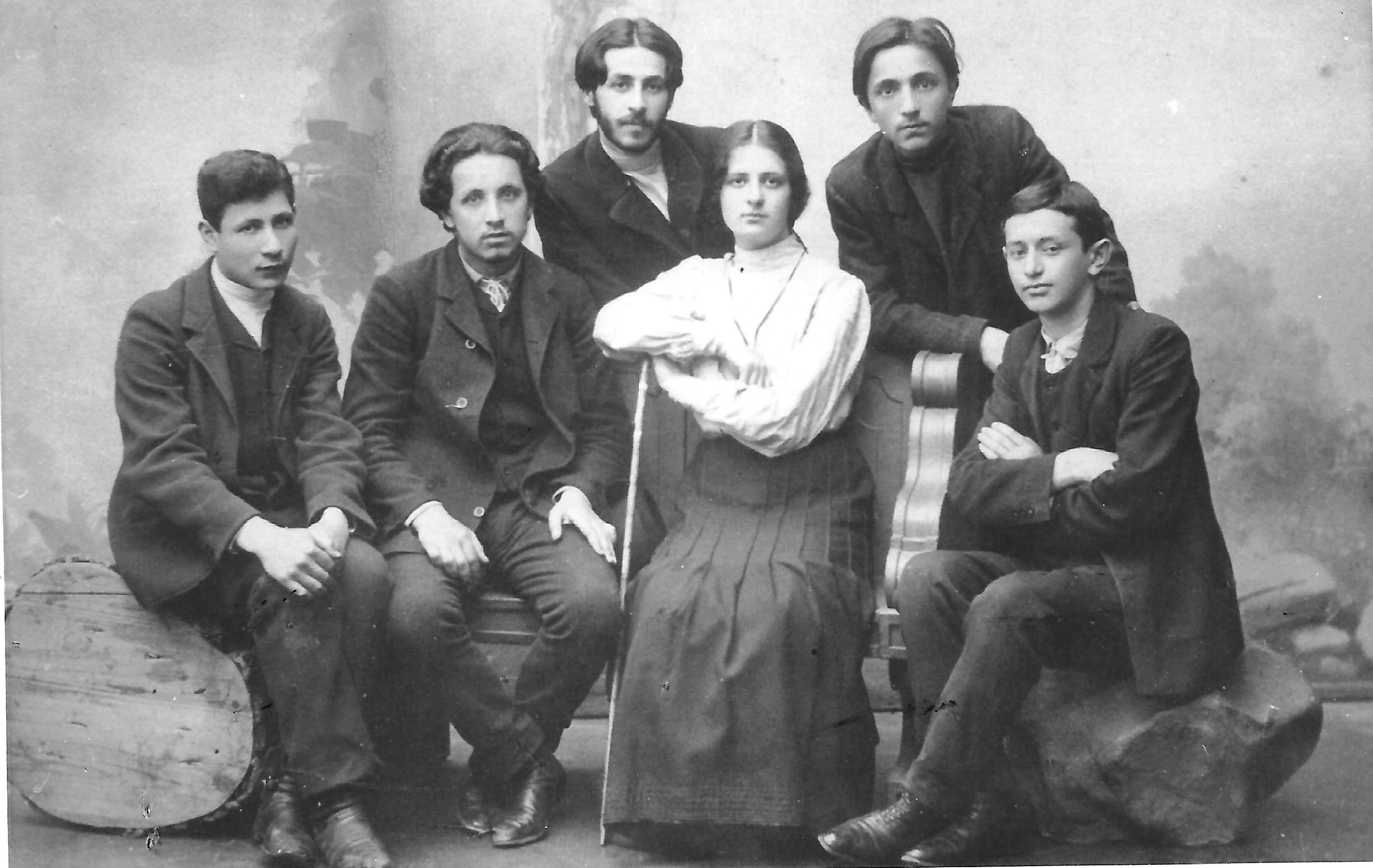 קבוצה של פועלי ציון מוורשה בשנת 1905 עומדים מימין לשמאל אליעזר סלוצקין ויצחק טבנקין יושבים מימין לשמאל מקס שלא עלה לארץ ישראל, אווה טבנקין אחותו של יצחק טבנקין יוסף זלצמן ואלקנה הורוביץ